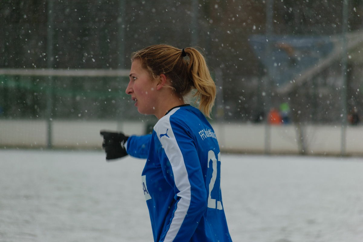 Louisa Nöhr im Dezember 2017, vs FC Ingolstadt Frauen